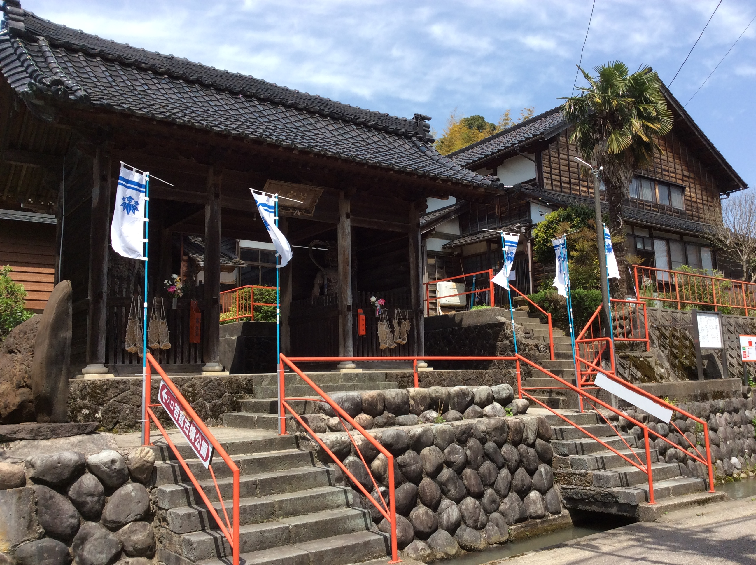 医王院 外観